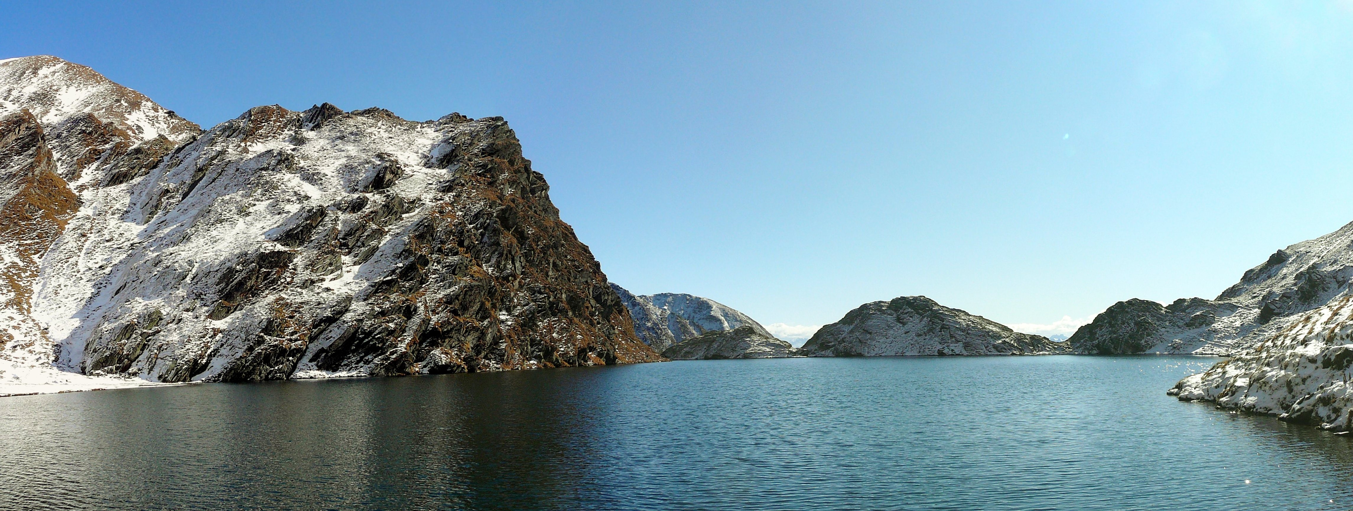 Seefeldsee in Alta val di Fossa (Rio di Pusteria)